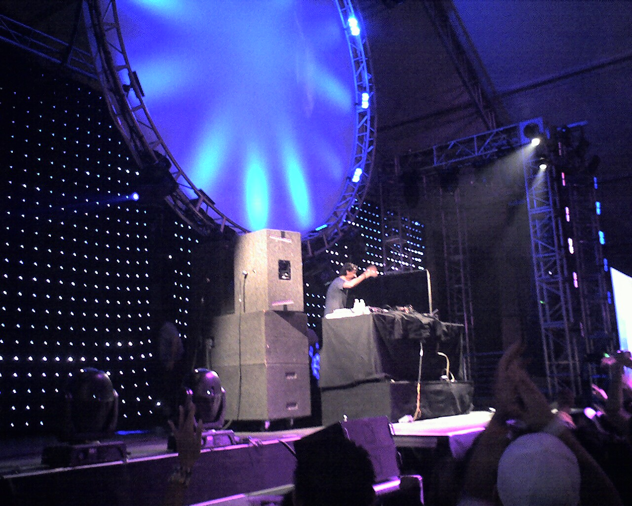 Benny Benassi